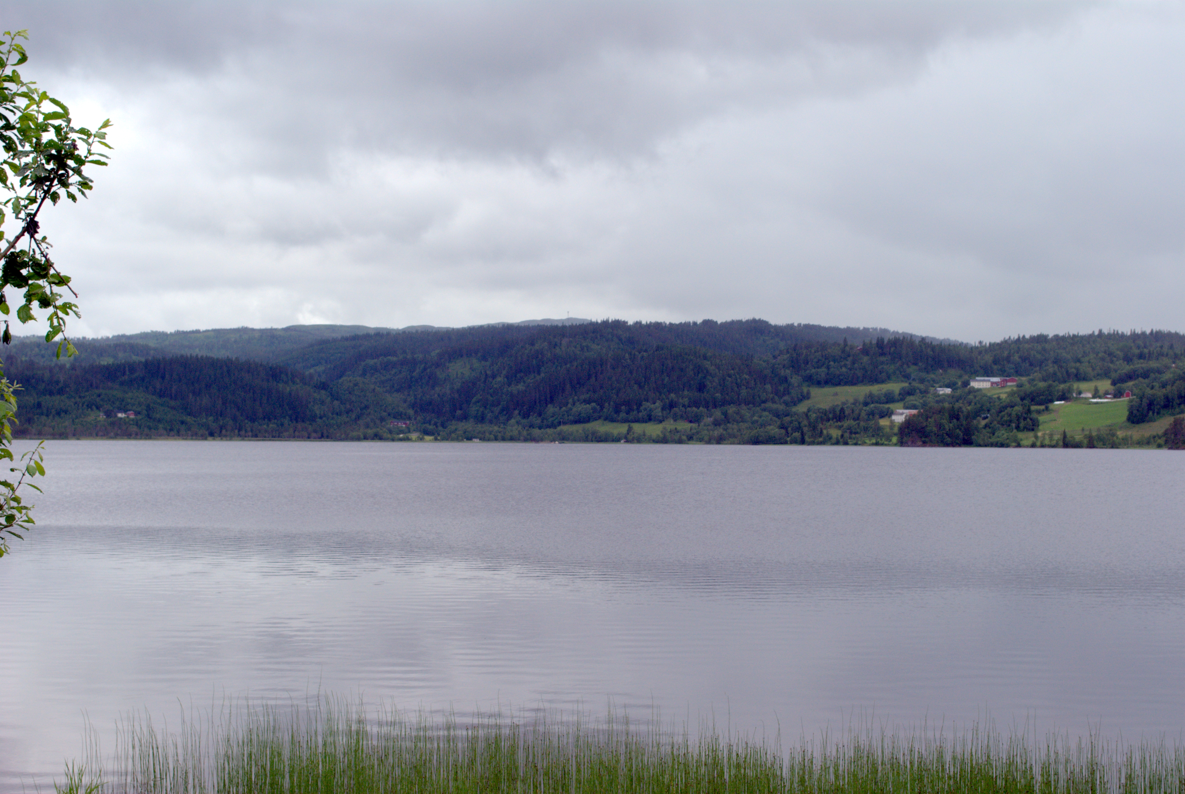 Ringavatnet i Meldal kommune i Sør-Trøndelag.